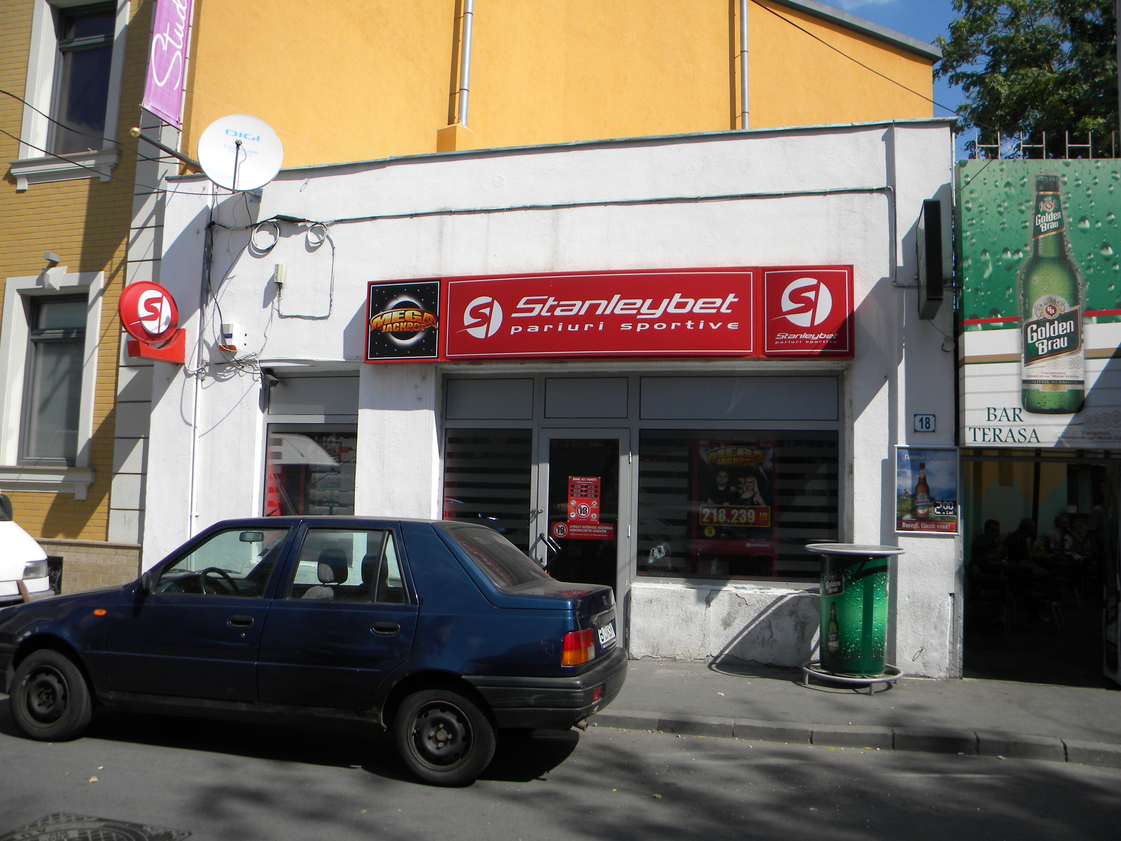 Bucuresti, Romania, Str. Atelierului nr. 18, sect. 1 (1); B-II-m-B-18009